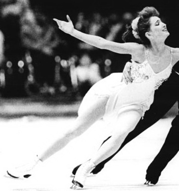 Factual corrections and alternative descriptions are encouraged separately from the original description. Additionally errors can be reported at this page to inform the Bundesarchiv. Original historic description: Marina Klimowa, Sergej Ponomarenko ADN-ZB Settnik 7.4.89 Berlin: ISU-Weltschaulaufen in der Werner-Seelenbinder-Halle (am 6.4.89)- Großen Beifall der 4000 Zuschauer erhielten die Weltmeister im Eistanz, Marina Klimowa-Sergej Ponomarenko (UdSSR), die den Abschluß der großen Gala bildeten.